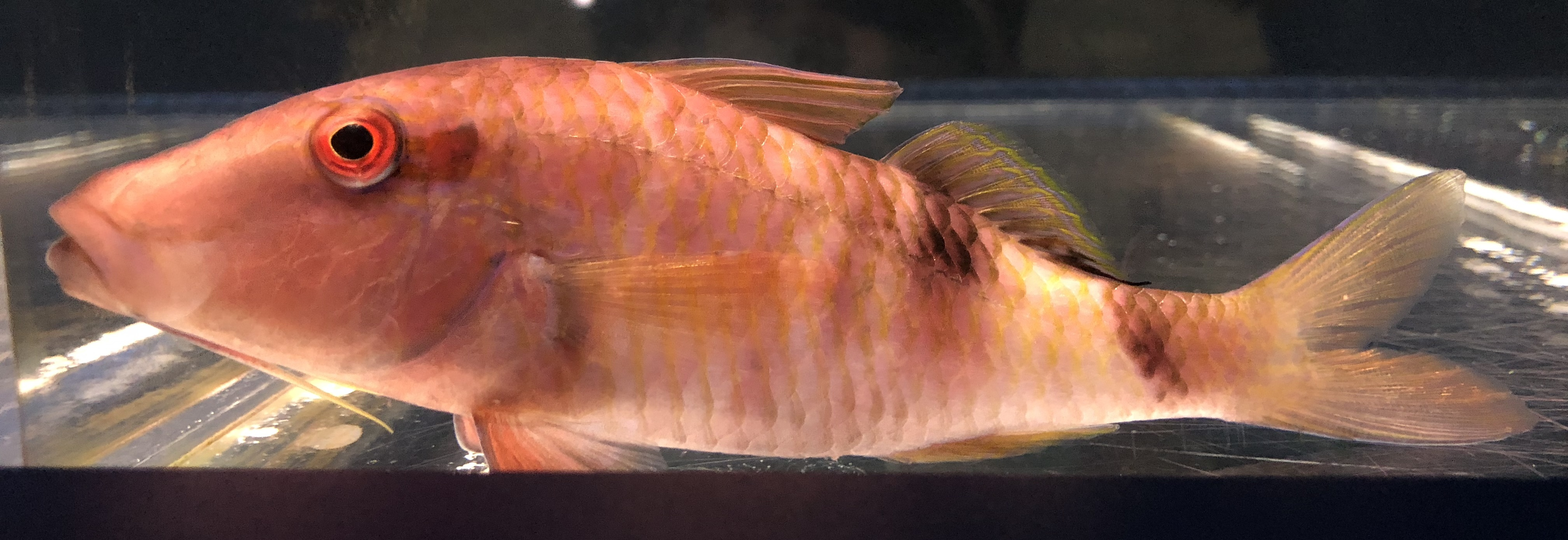 オジサン。海遊館飼育個体。